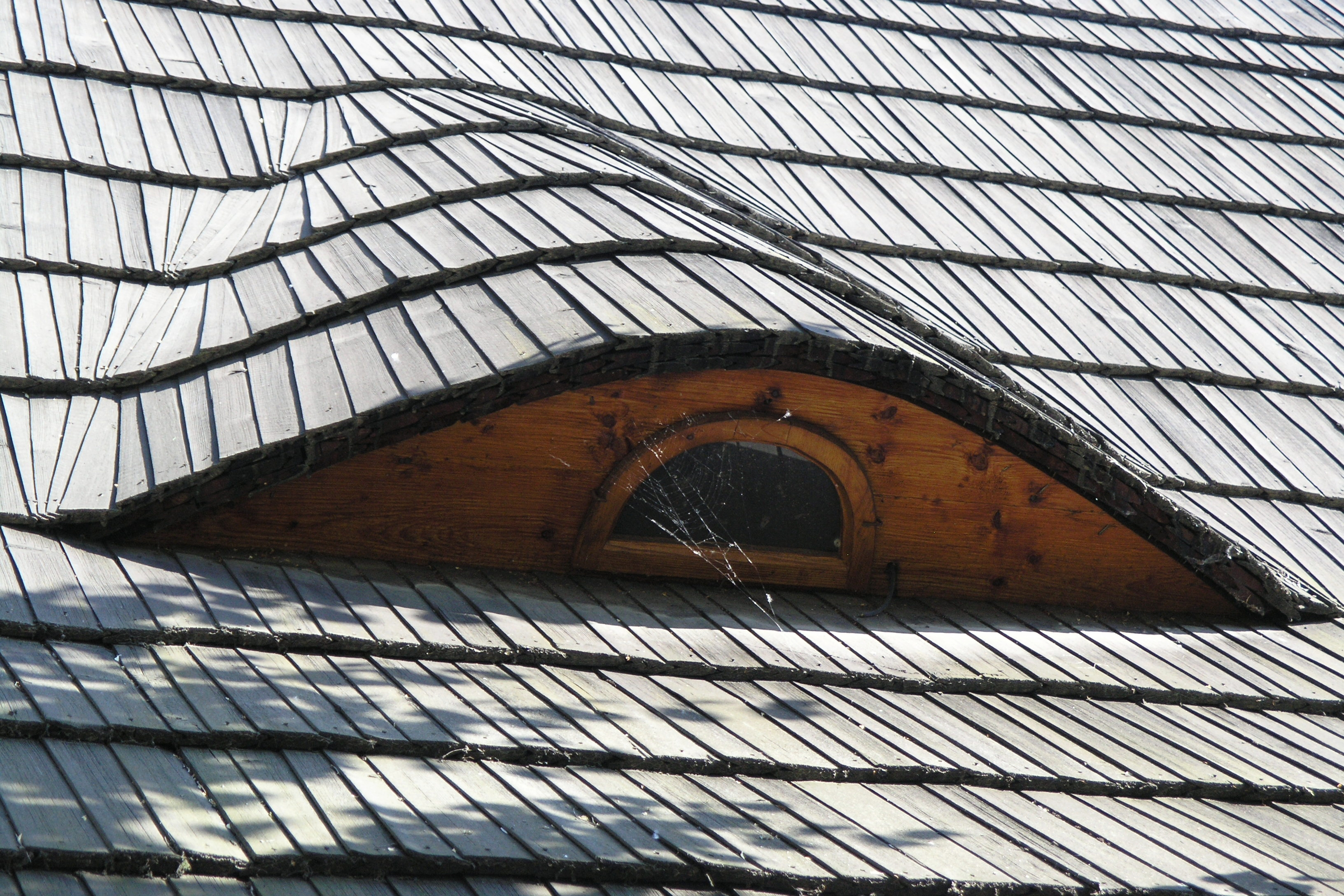 Venkovský dům U Raka, Praha 1, Černínská 93/10